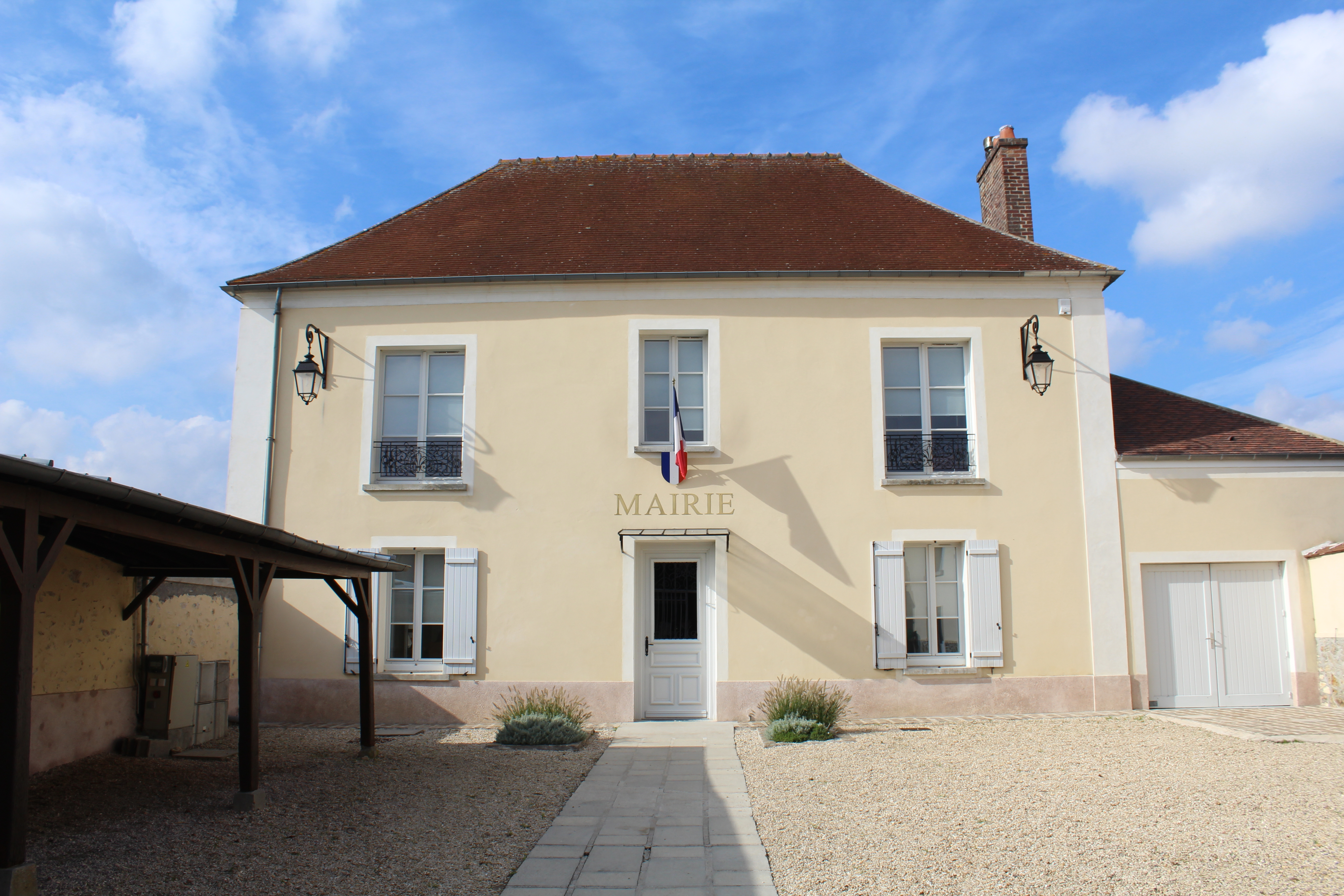 Mairie de Bussy-Saint-Martin.